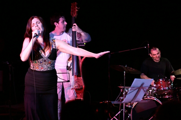 50 anos - Maxime